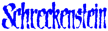 Das Logo der Kinderbuchserie Burg Schreckenstein von Oliver Hassencamp